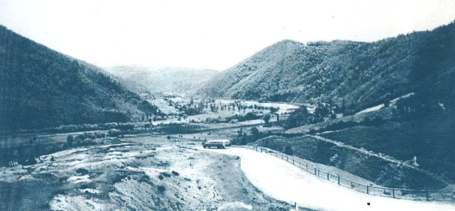 Ciucea, Cluj County, Romania